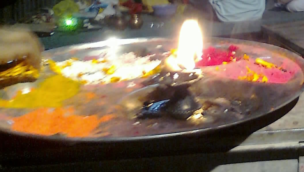 Durga puja thali at Chinawal village, India